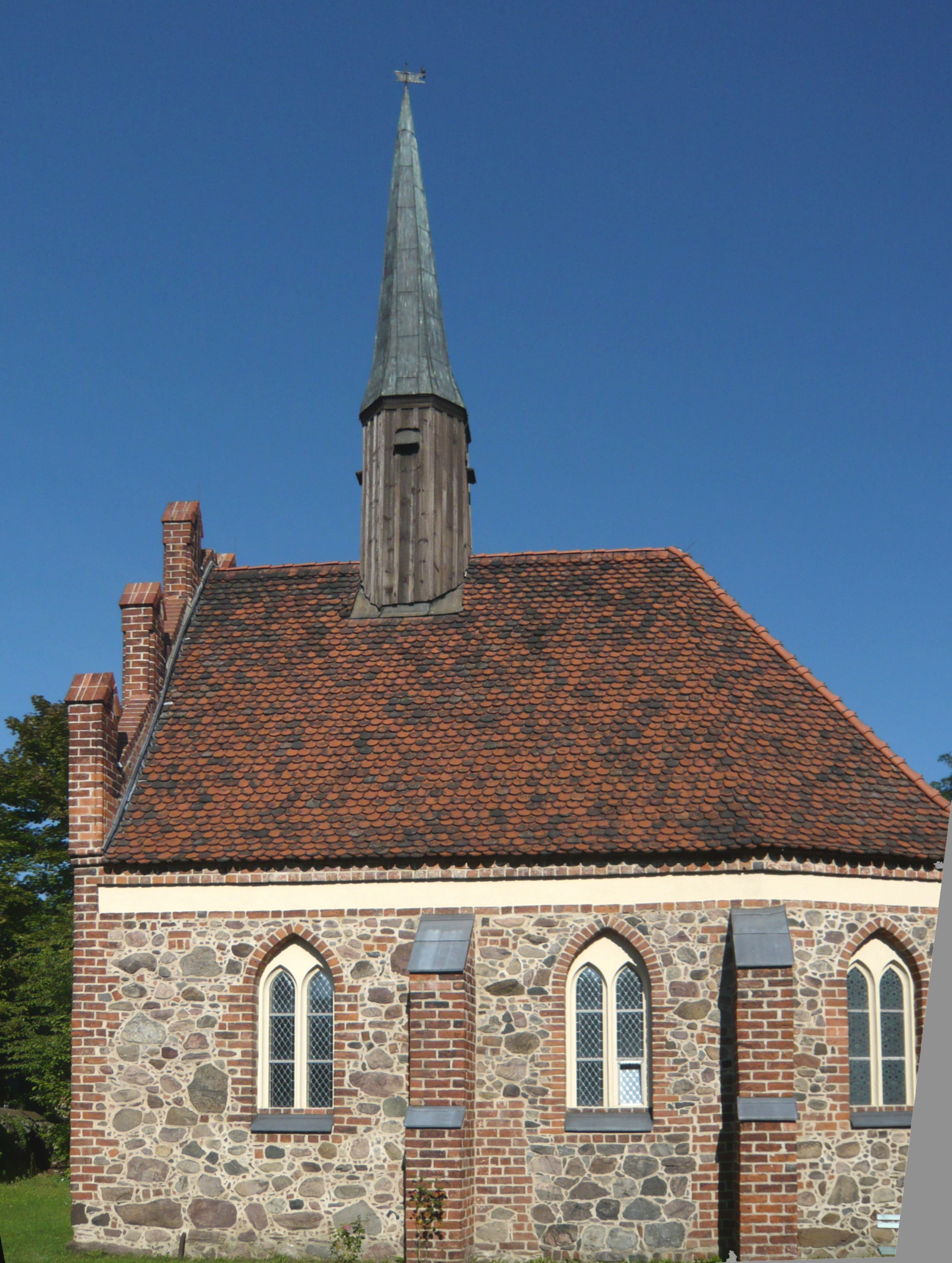 Bernau bei berlin, St.-Georgen Hospital: Kapelle